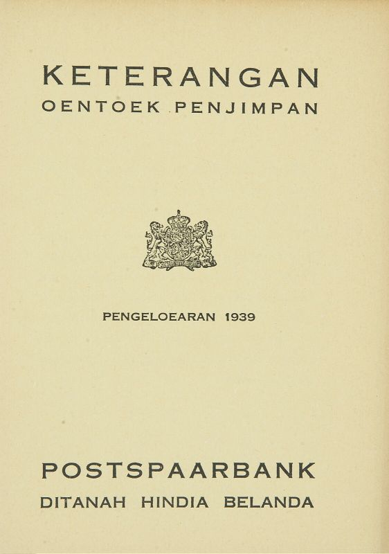 Brochure. Boekje in het Maleis van de Postspaarbank Keterangan